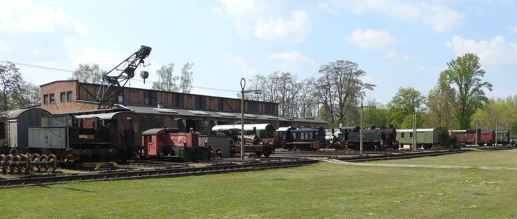 Lokpark Braunschweig am 01.05.2016 Bildausschnitt aus der Datei: 2016050101 W Lokpark Braunschweig.JPG